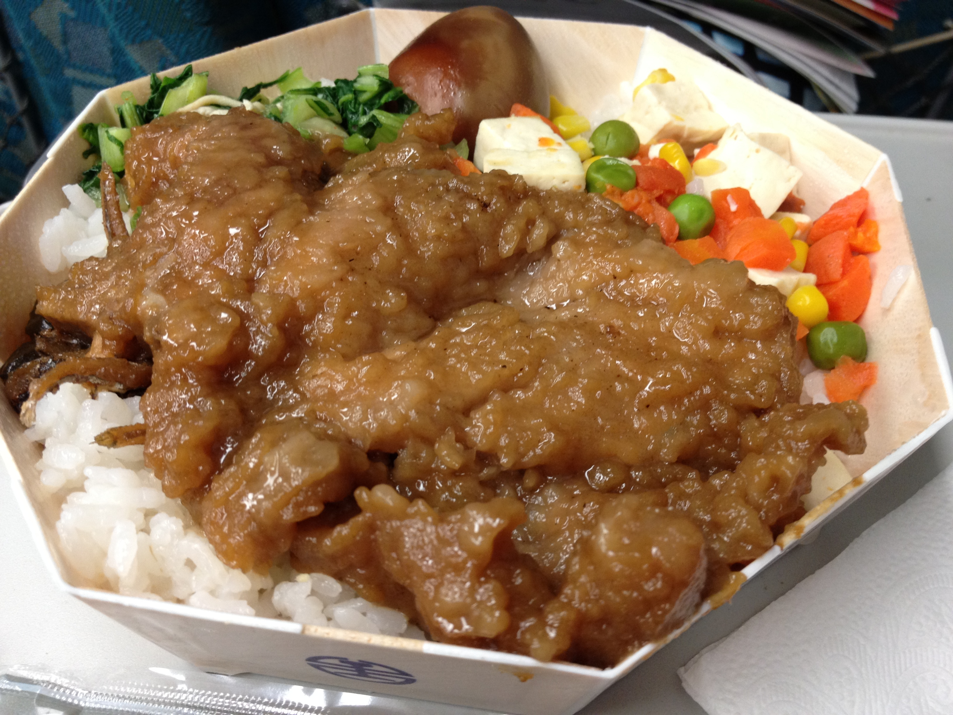 TRA Bento